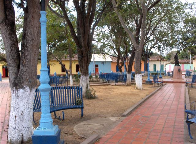 Plaza Bolívar de Chaguaramas, Estado Guárico, Venezuela